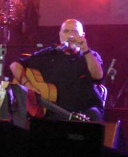 Peret at Mercè BCN 2007